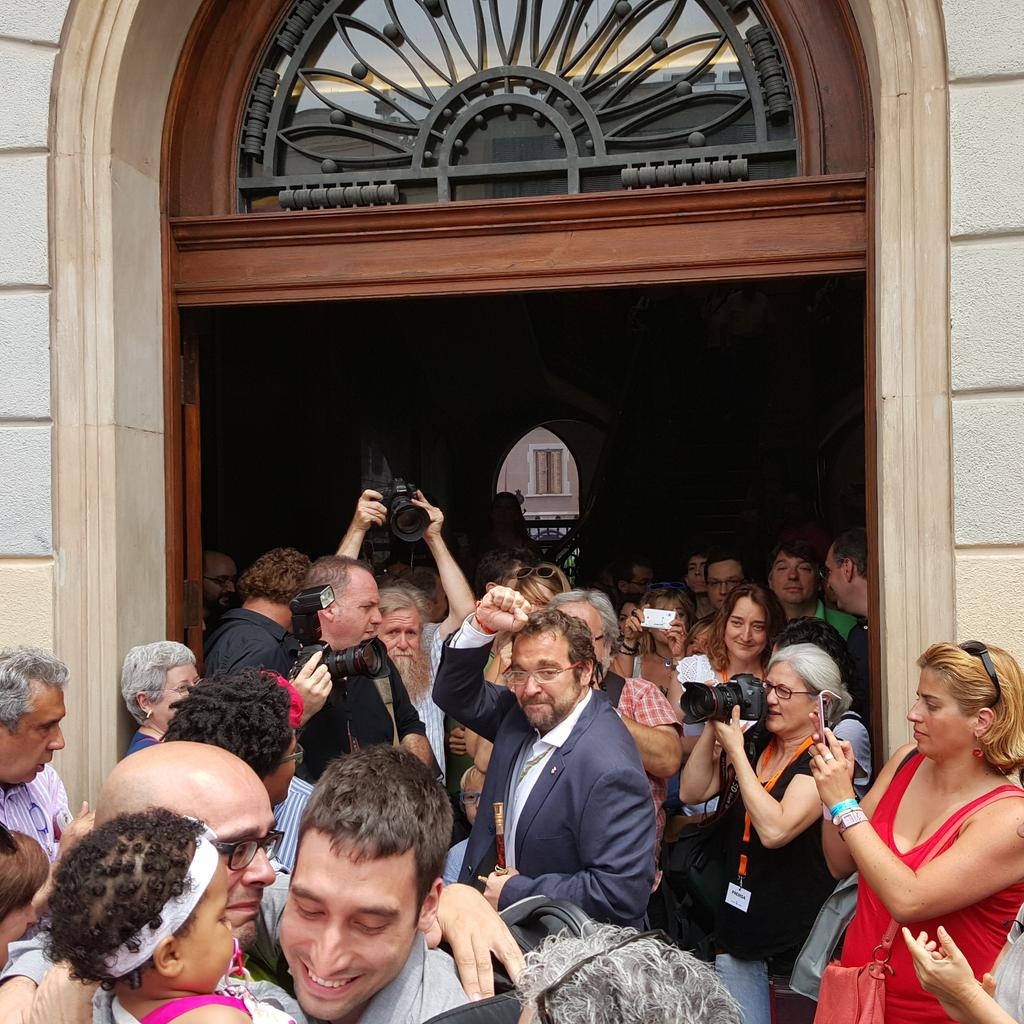 Julià Fernàndez Sabadell 13 de juny 2015 després ser nomenat Alcalde de Sabadell